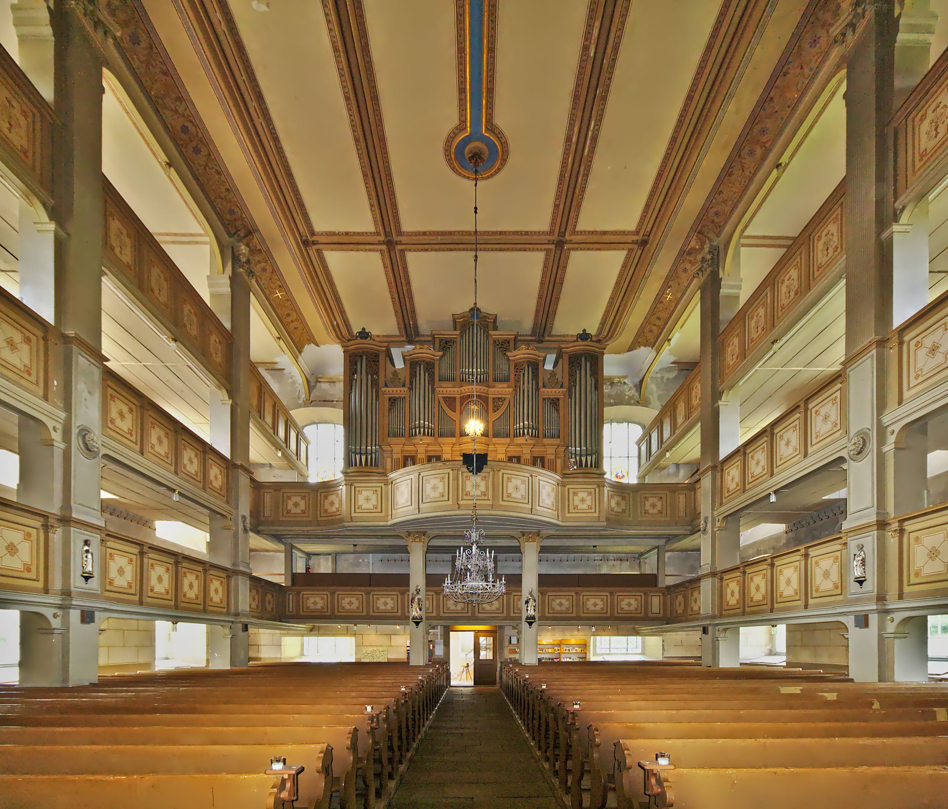 Blick zur Orgel, sie wurde 1840 von den Orgelbauern Gottfried Müller und Christian Friedrich Reiß aus Neugersdorf fertiggestellt. Sie umfasst 3 Manuale, 36 klingende Register und 2.229 Pfeifen mit einer mechanischen Traktur.